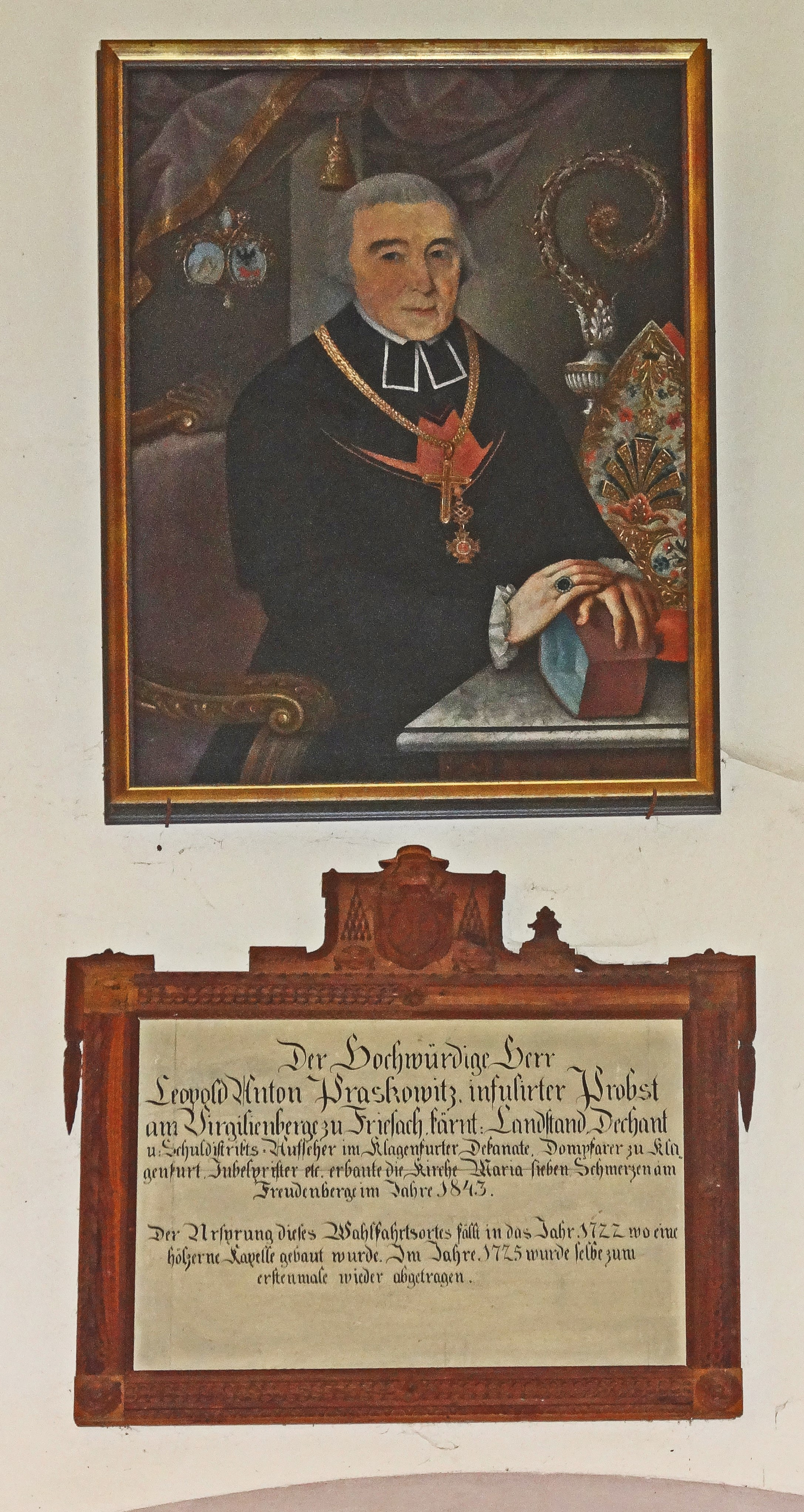 Kath. Filialkirche, Wallfahrtskirche Maria Sieben Schmerzen, Porträt des Stifters Leopold Anton Praskowitz und Inschrifttafel